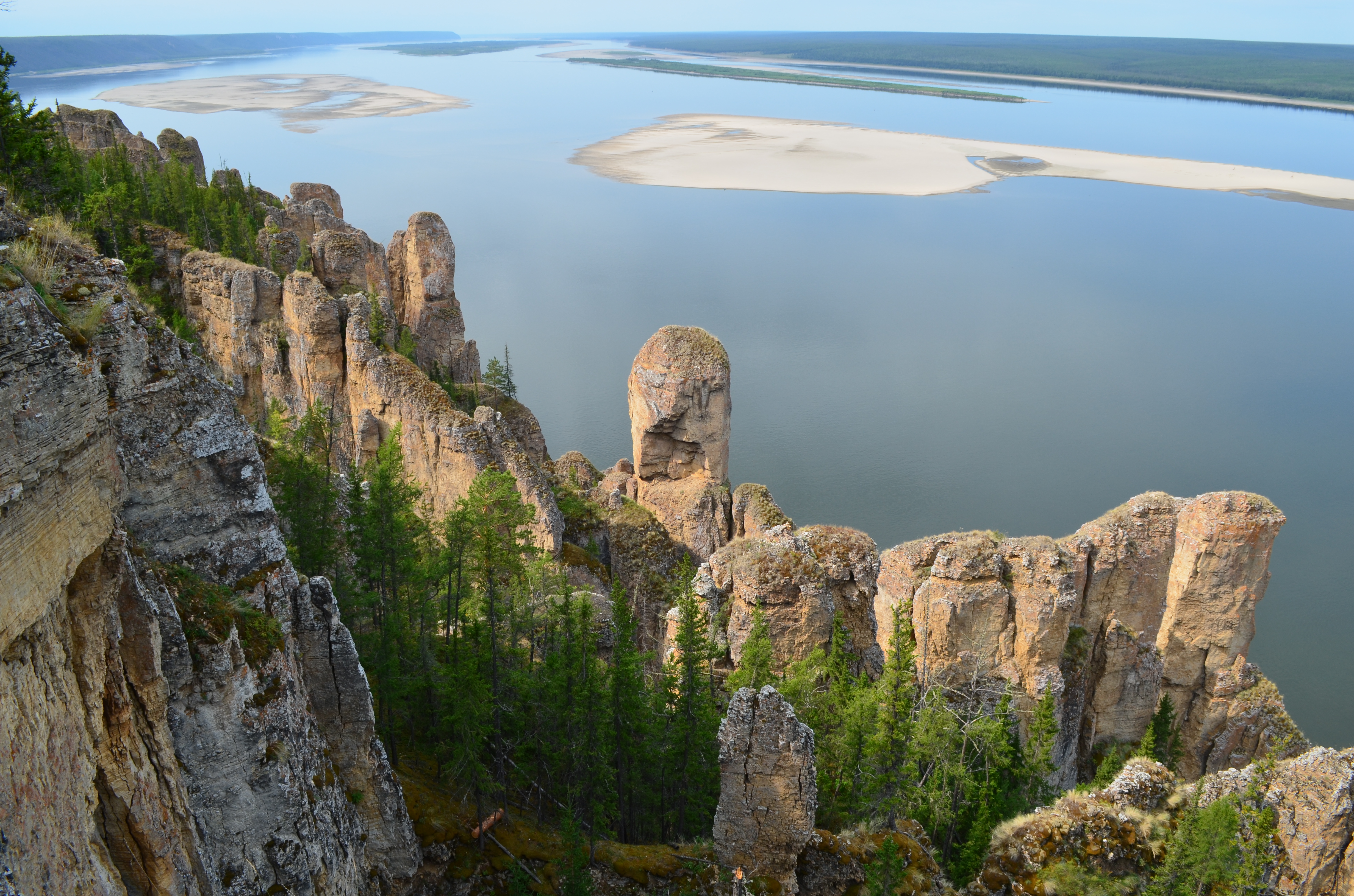 Поездка на Ленские столбы на теплоходе «Демьян Бедный», 31.07.2015 - 02.08.2015. День второй. Виды со смотровой площадки.